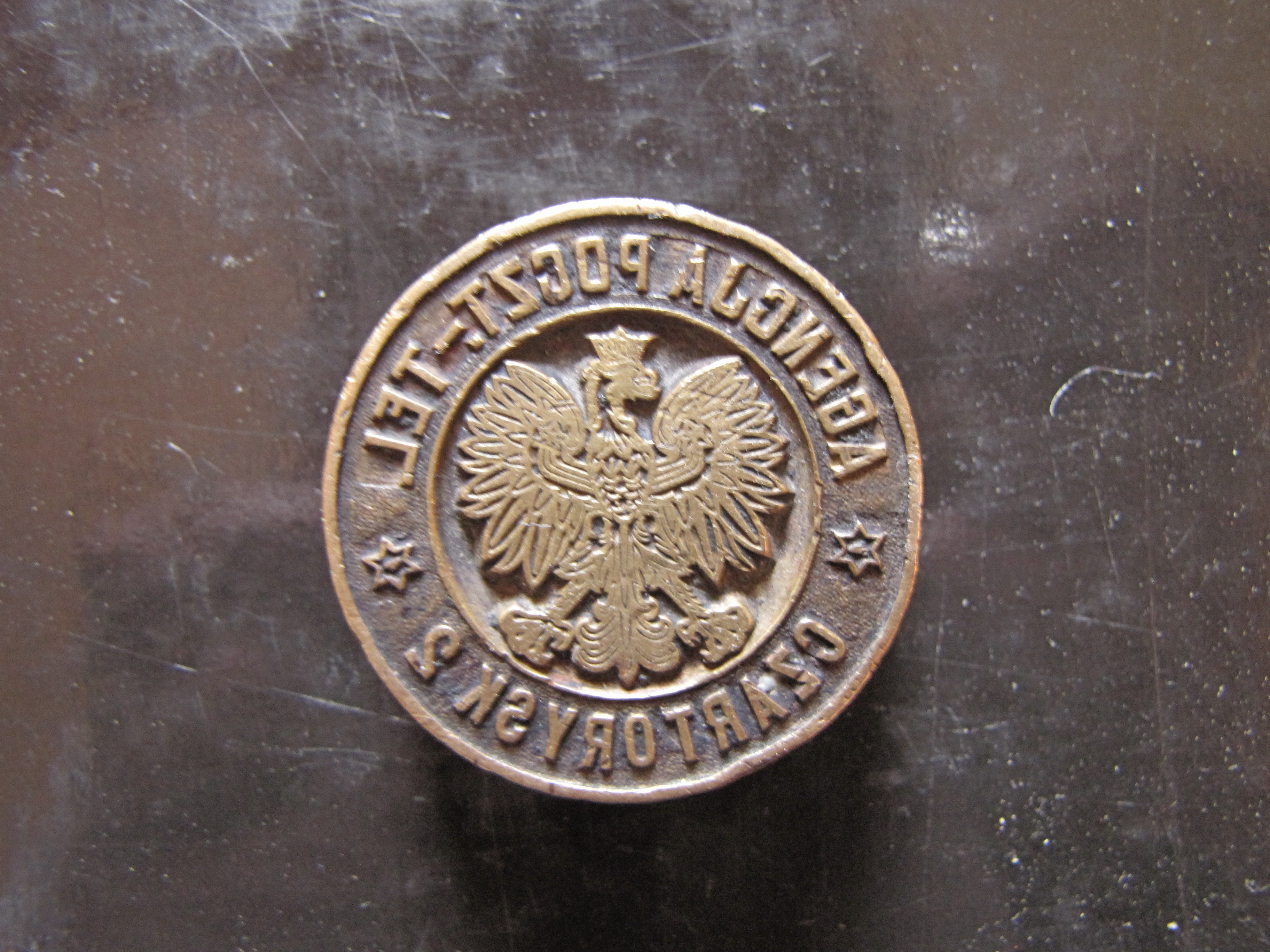 Stempel Agencja Pocztowo-Telegraficzna Czartorysk 2 (Województwo wołyńskie, II Rzeczpospolita 1918-1945)